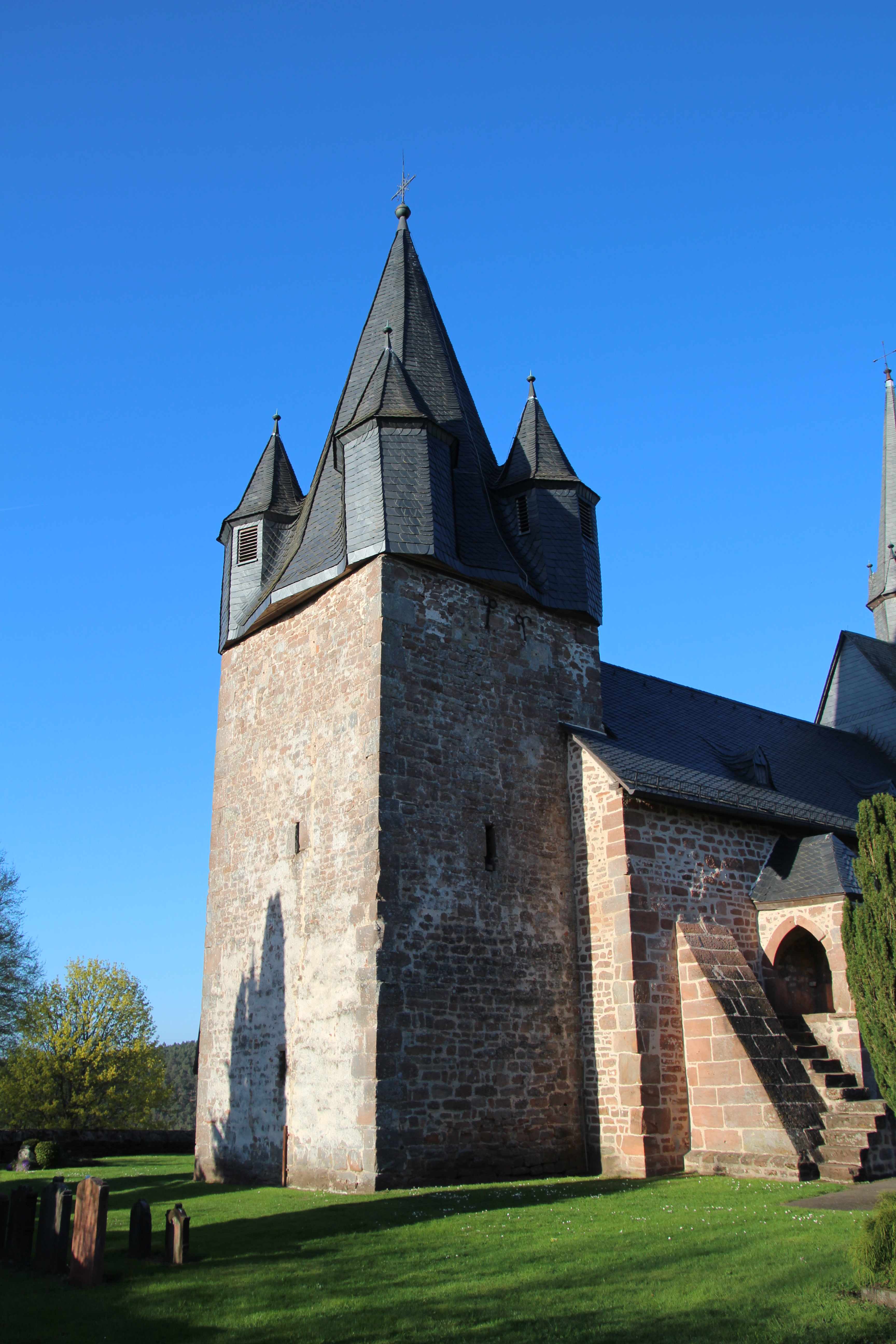 Christenberg